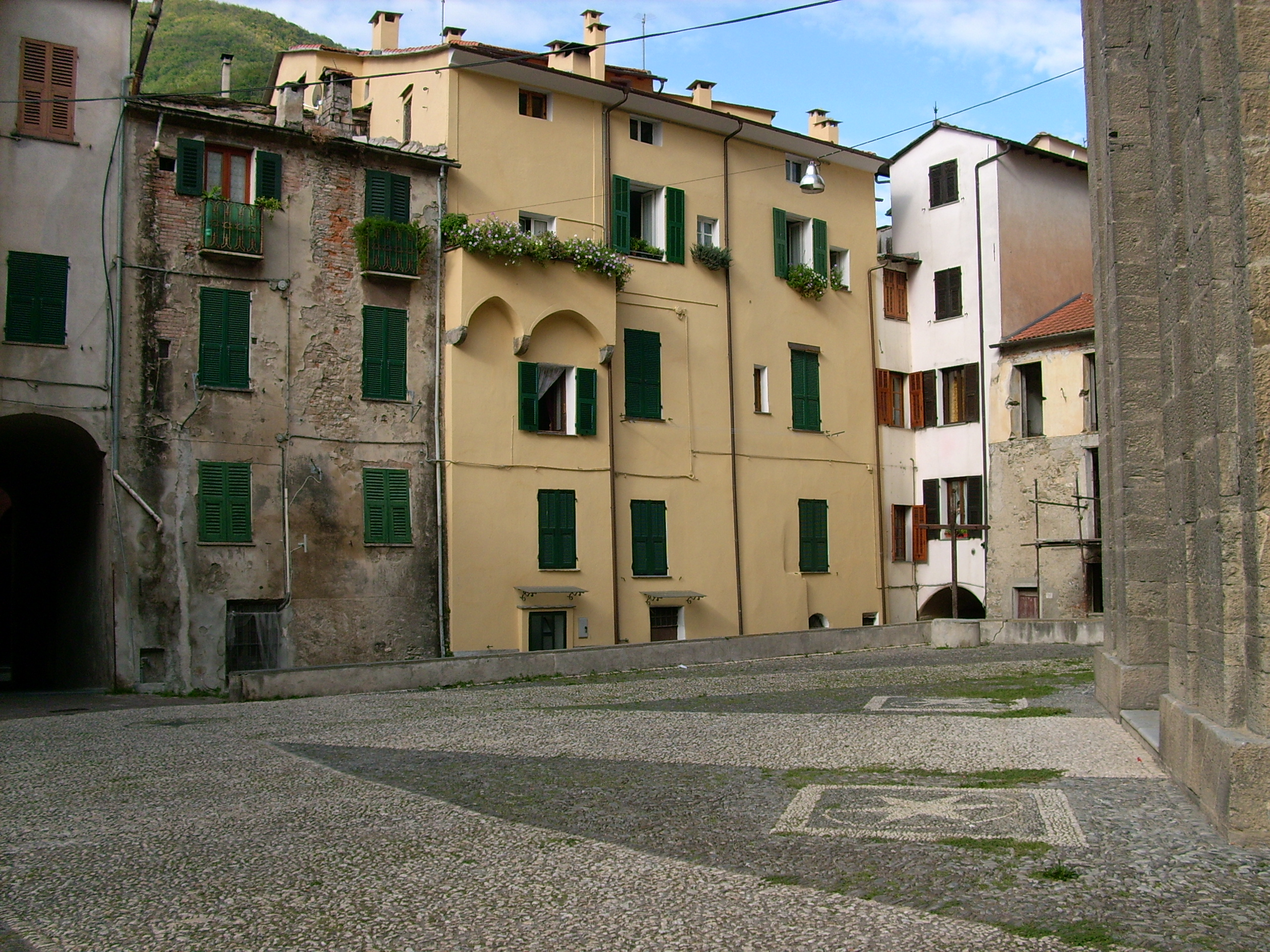 Centro storico di Pieve di Teco, Liguria, Italia